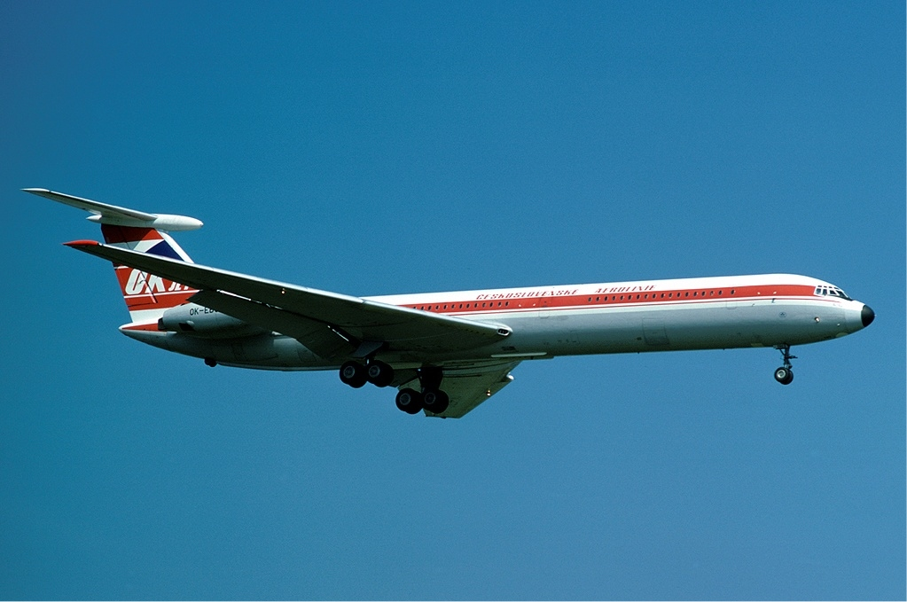 CSA Ilyushin Il-62